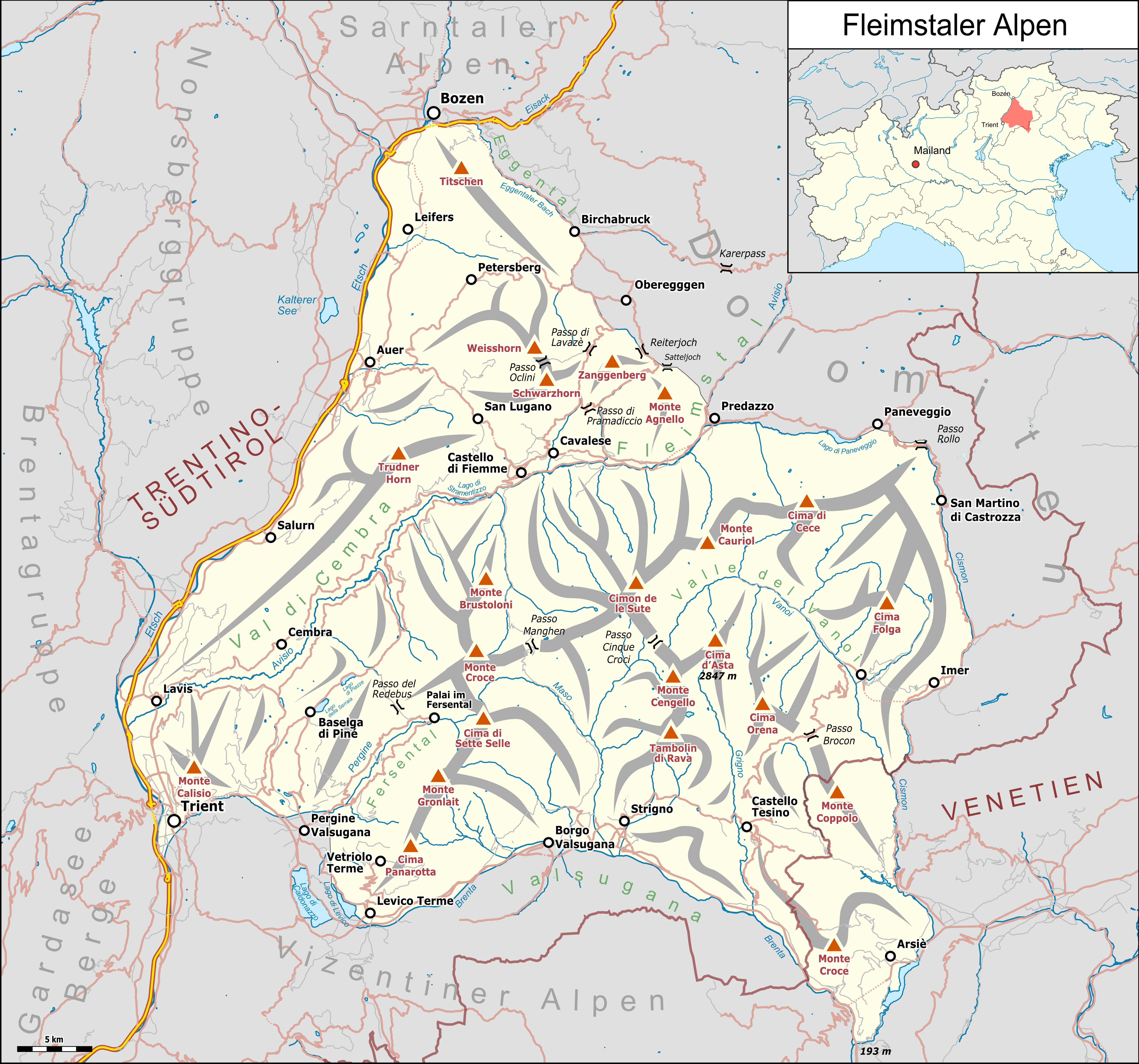 Übersichtskarte der Fleimstaler Alpen